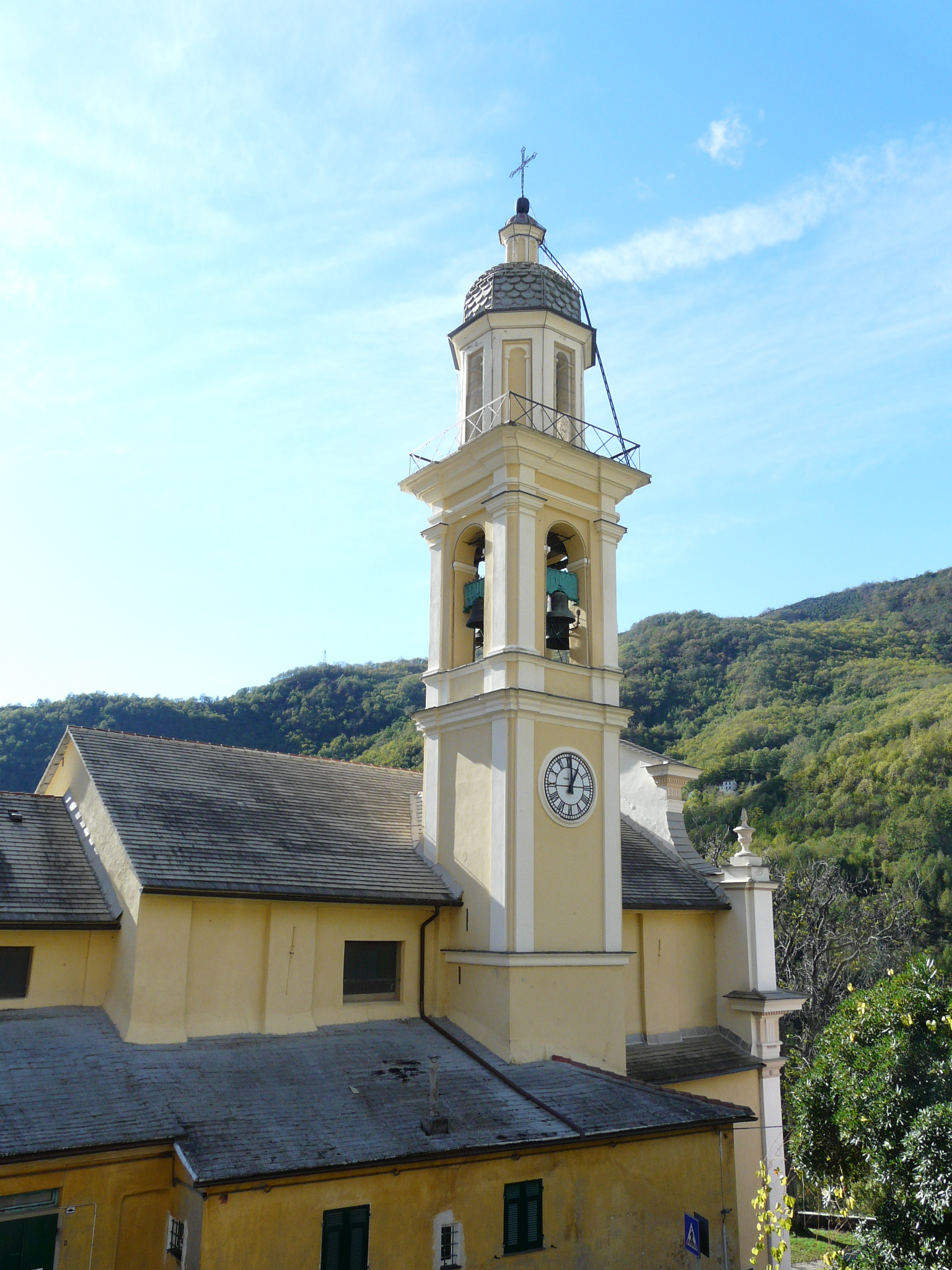 Chiesa di San Maurizio, Neirone, Liguria, Italia